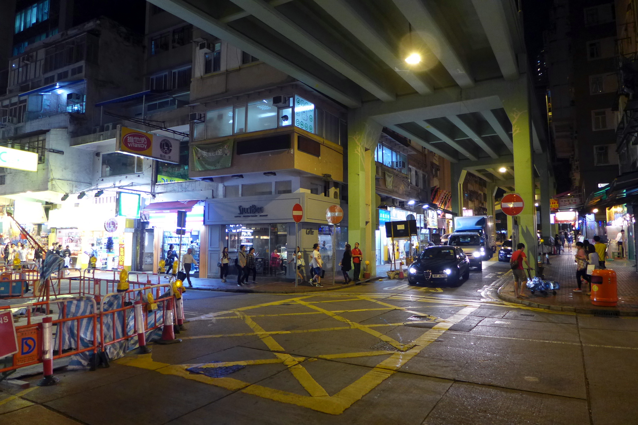 Tsing Fung Street